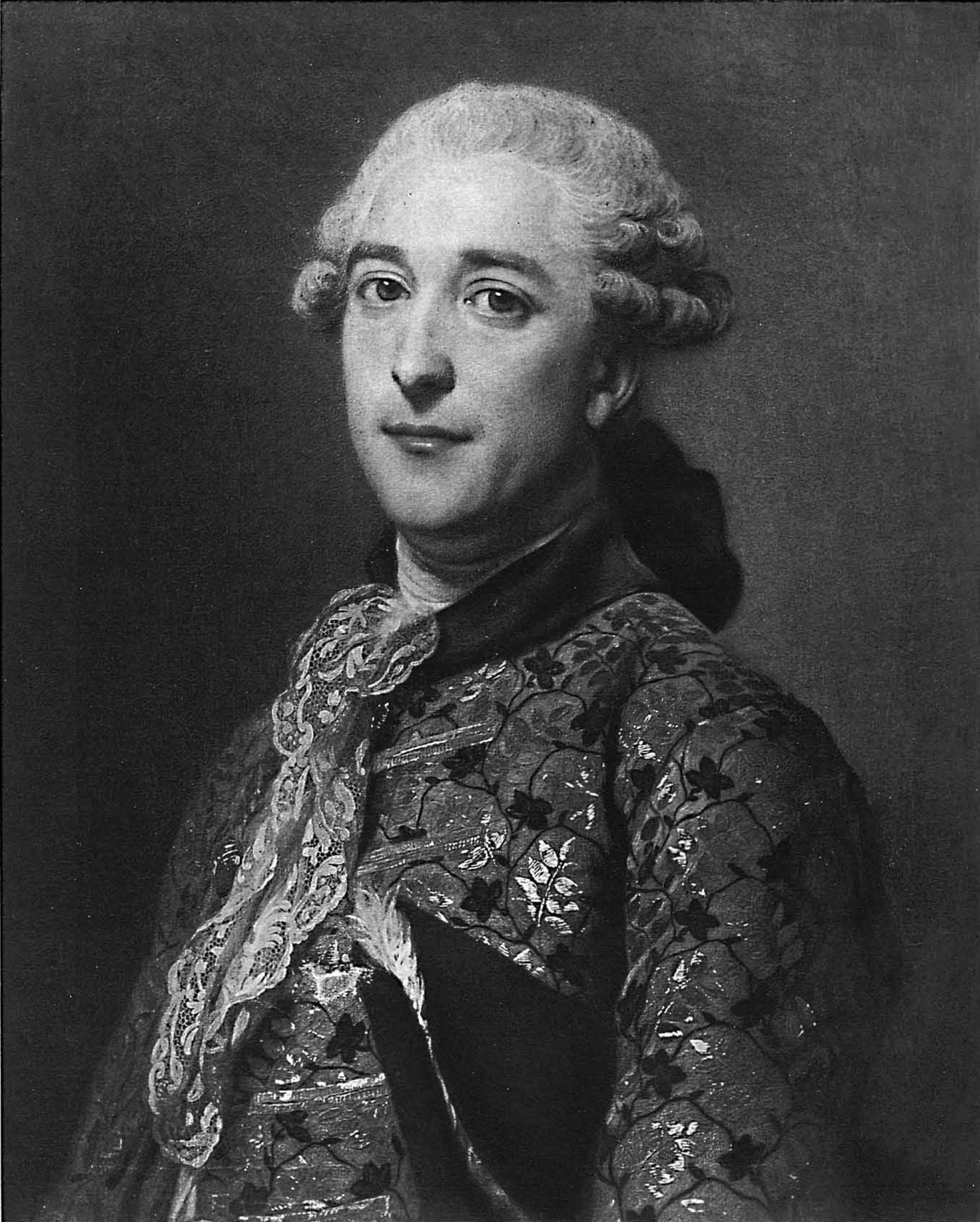 «Князь Владимир Борисович Голицын (1731-1798)»